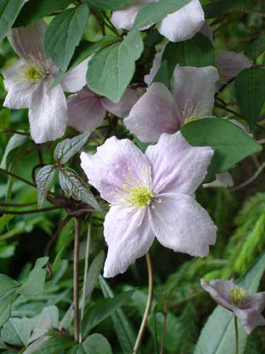 Clematis 'Mayleen'